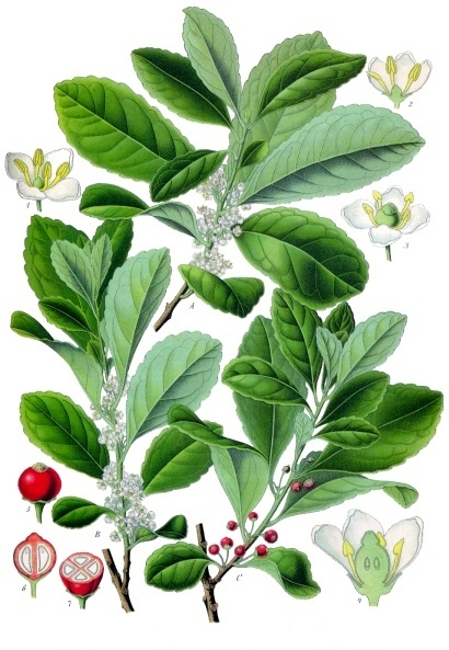 Mate-Strauch. A männlicher Zweig. B weiblicher Zweig. C Fruchtzweig. 1 männliche Blüte. 2 dieselbe im Längsschnitt. 3 weibliche Blüte. 4 dieselbe im Längsschnitt. 5 Frucht. 6 dieselbe im Längsschnitt. 7 dieselbe im Querschnitt. A, B, C etwas verkleinert. 1—7 vergrössert.